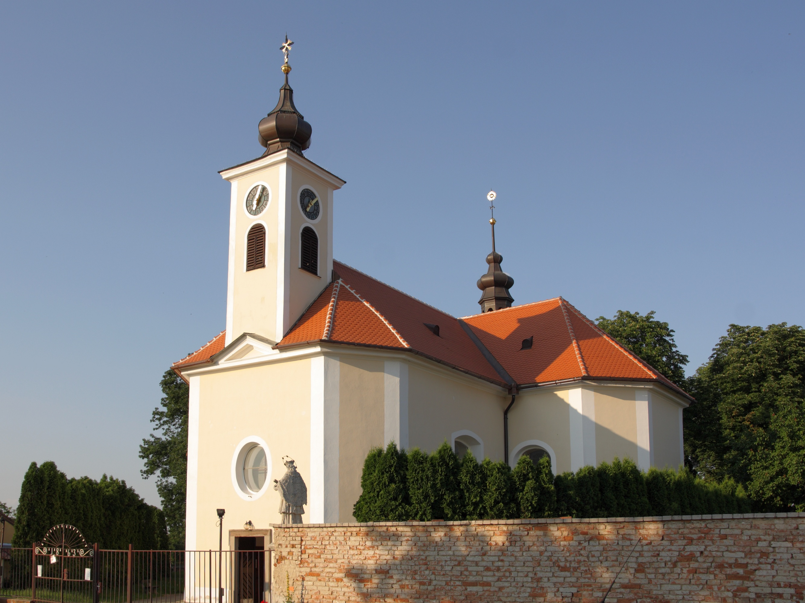 Syrovice - Kostel svatého Augustina.